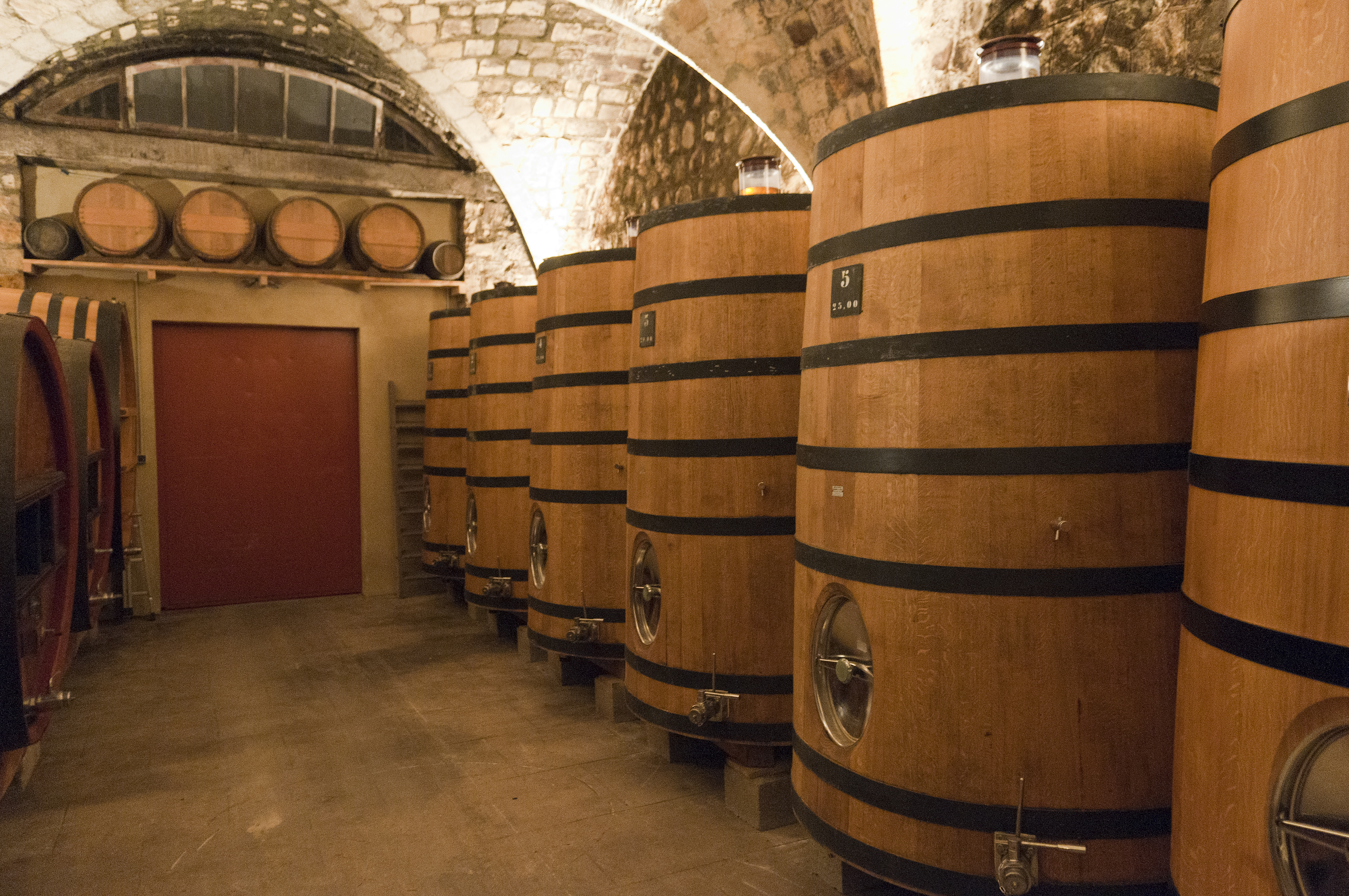 Cave de stockage à Château Simone